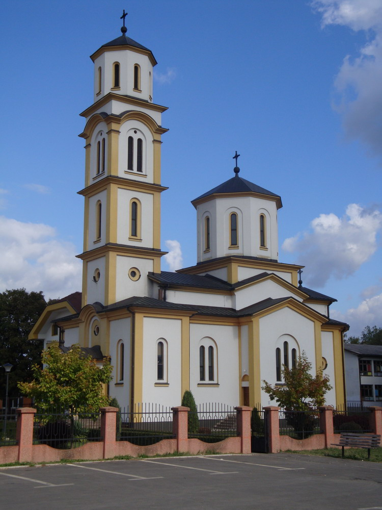 Храм Св. вмч. кнеза Лазара (Лазарево)